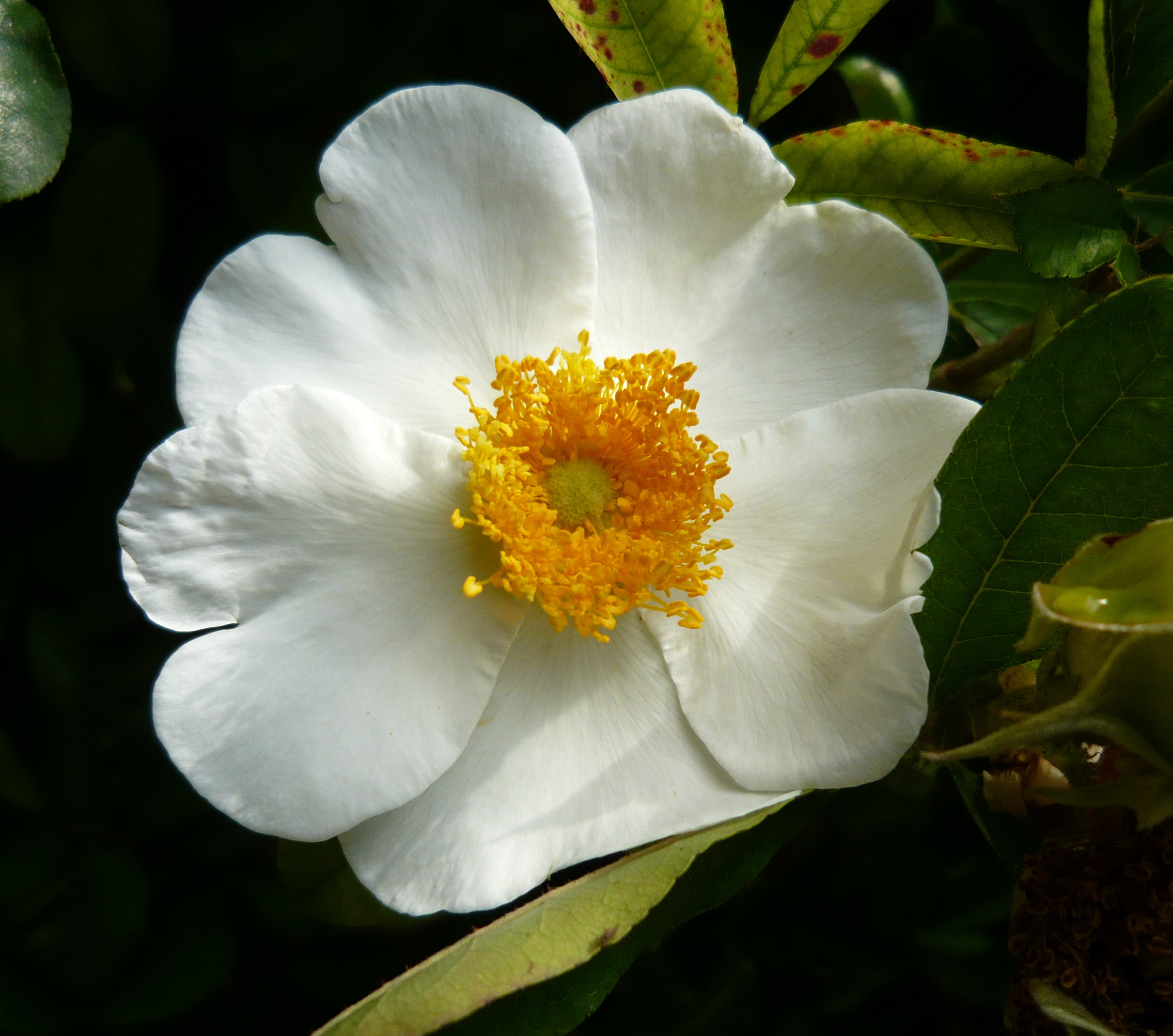 Rosa bracteata. Real Jardín Botánico de Madrid.